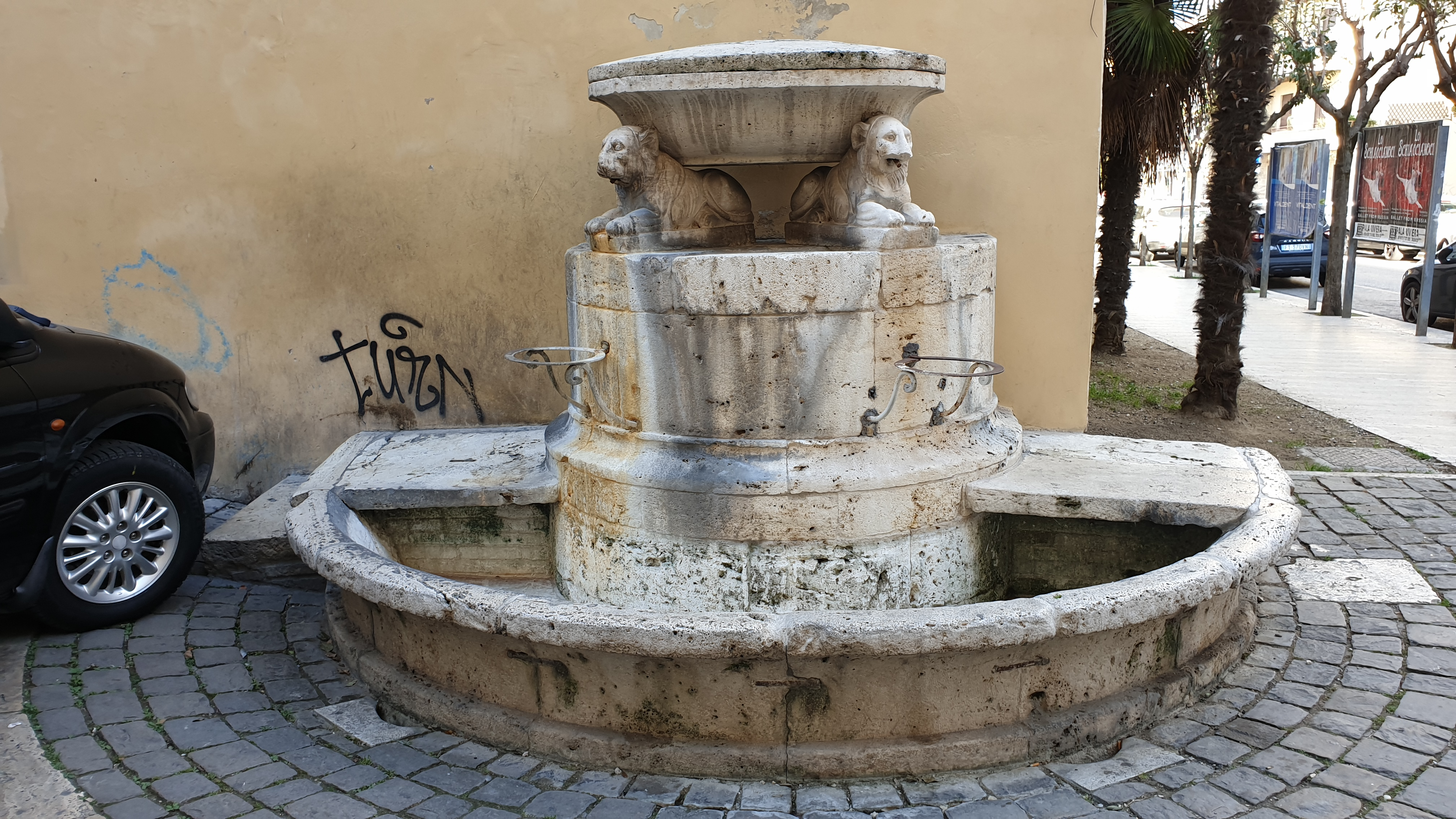 Ascoli Piceno: Fontana dei cani